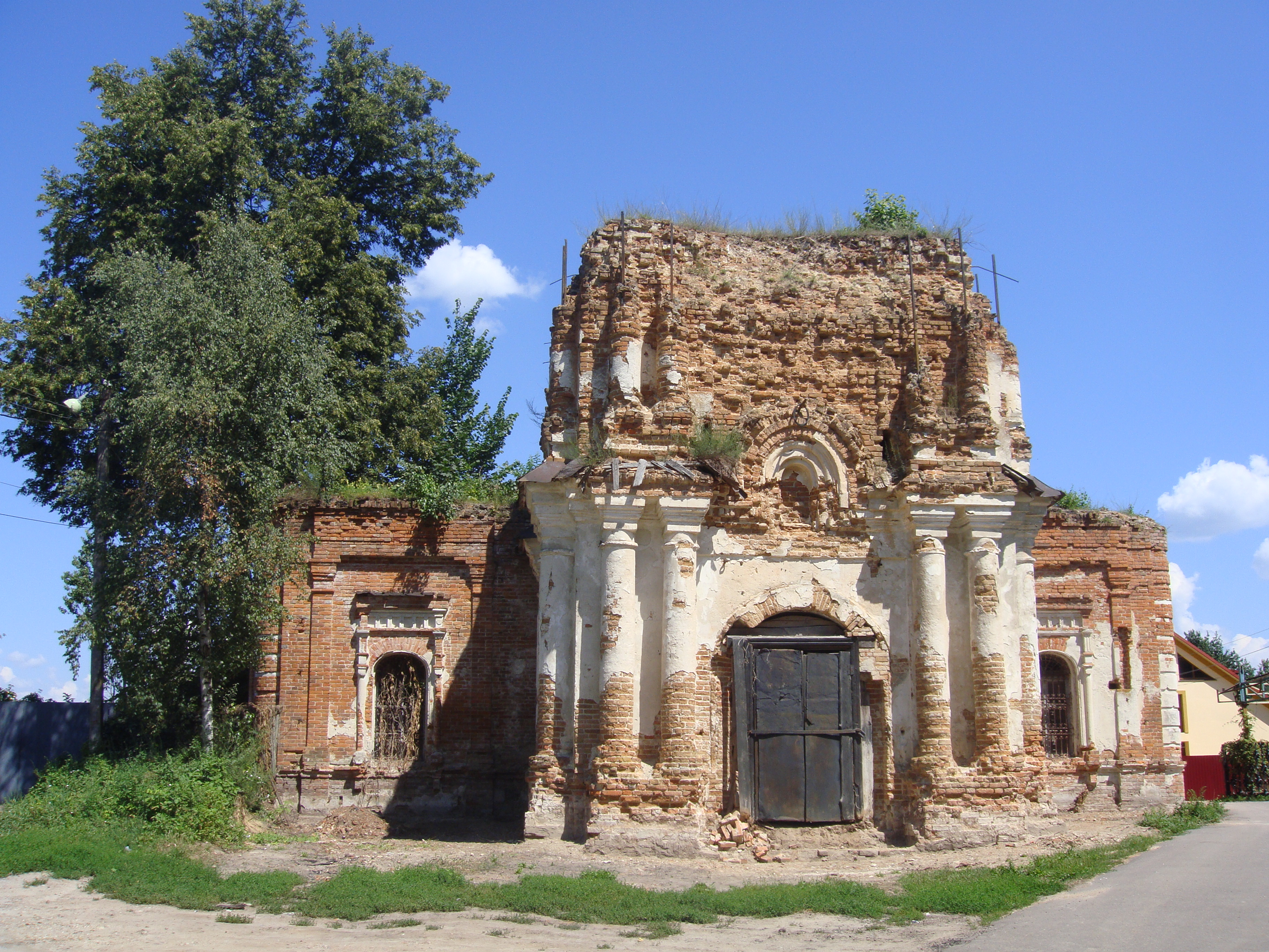 Преображенская церковь (1640), находится в процессе рассмотрения дела о реставрации. (Брянская область, Трубчевск)